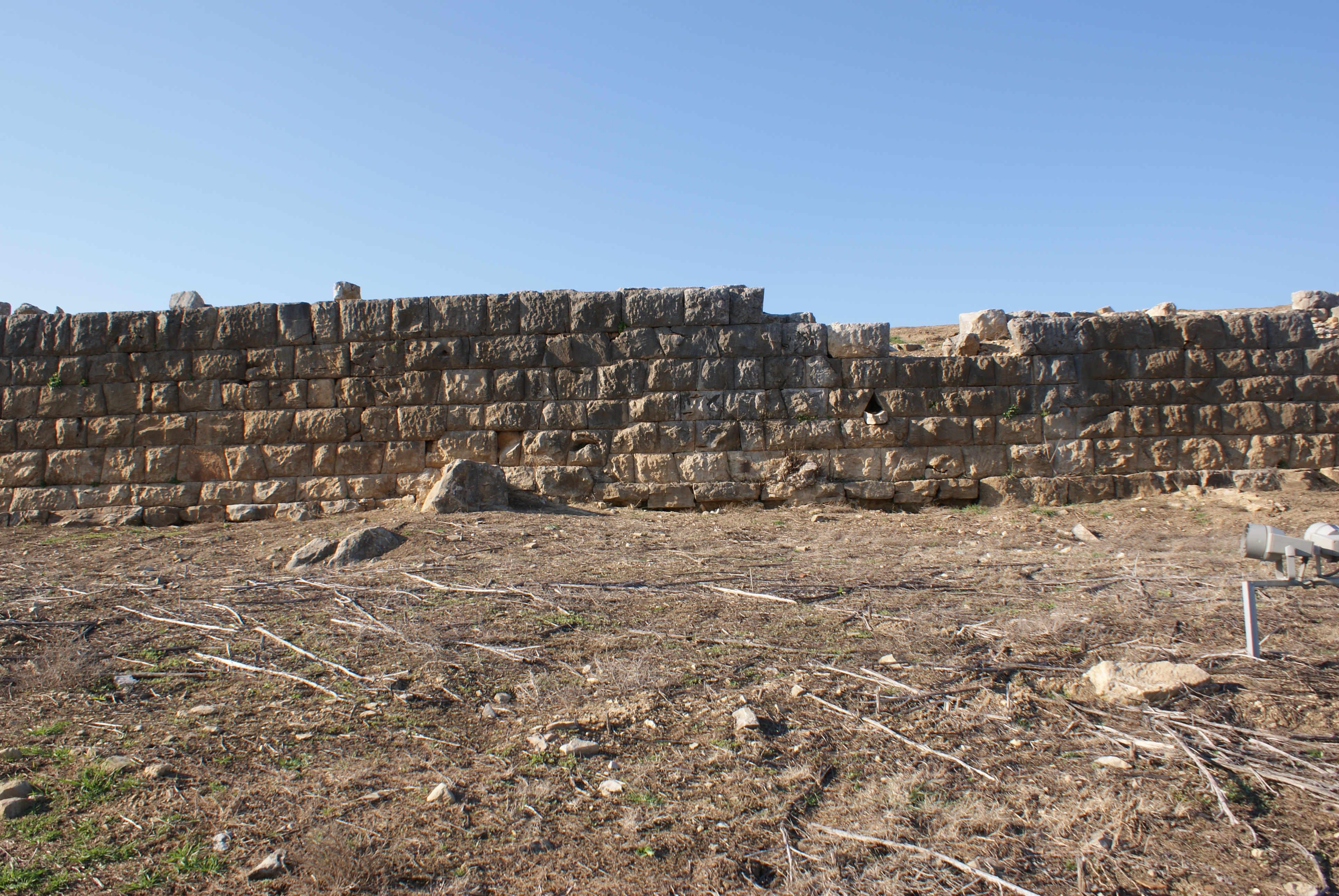 προερνα πανω